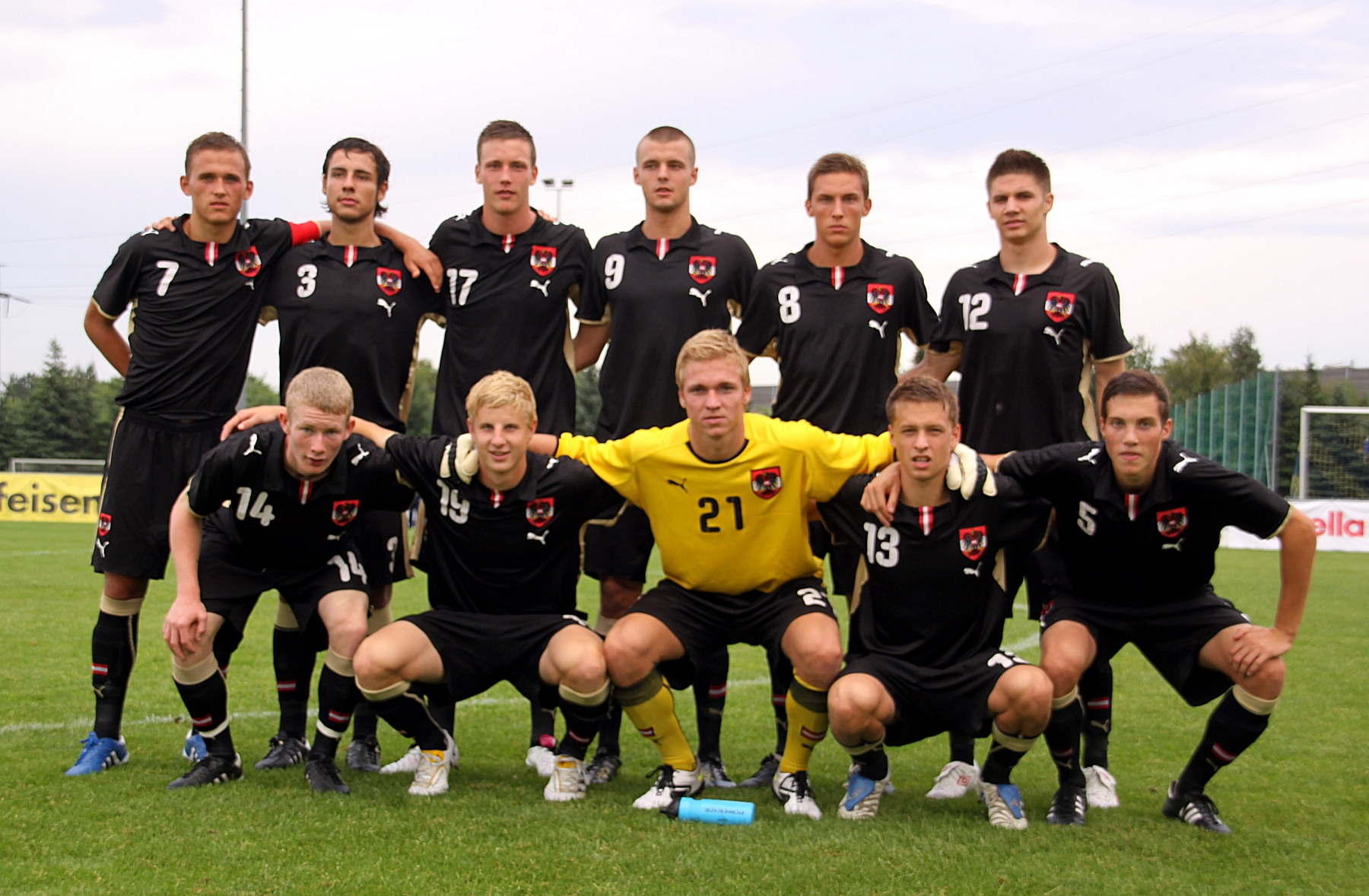 Österreichische Fußballnationalmannschaft (U-19-Männer) – Das Bild zeigt jeweils von links nach rechts: 1. Reihe (hockend): Florian Kainz (SK Sturm Graz, 14), Martin Hinteregger (FC Red Bull Salzburg, 19), Georg Blatnik (SV Grödig, 21), Julian Erhart (SC Rheindorf Altach, 13), Florian Maier (LASK Linz, 5); 2. Reihe (stehend): Marcel Ziegl (SV Ried, 7), Christian Schilling (Grazer AK, 3), Alexander Aschauer (FC Red Bull Salzburg, 17), Philipp Prosenik (FC Chelsea, 9), Konstantin Kerschbaumer (SK Rapid Wien, 8), Patrick Farkas (SV Mattersburg, 12).